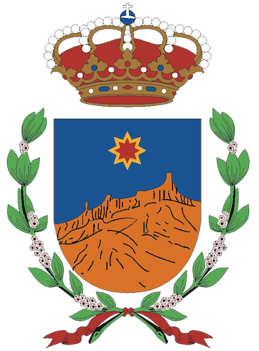 Escudo de Tejeda (Las Palmas, España)